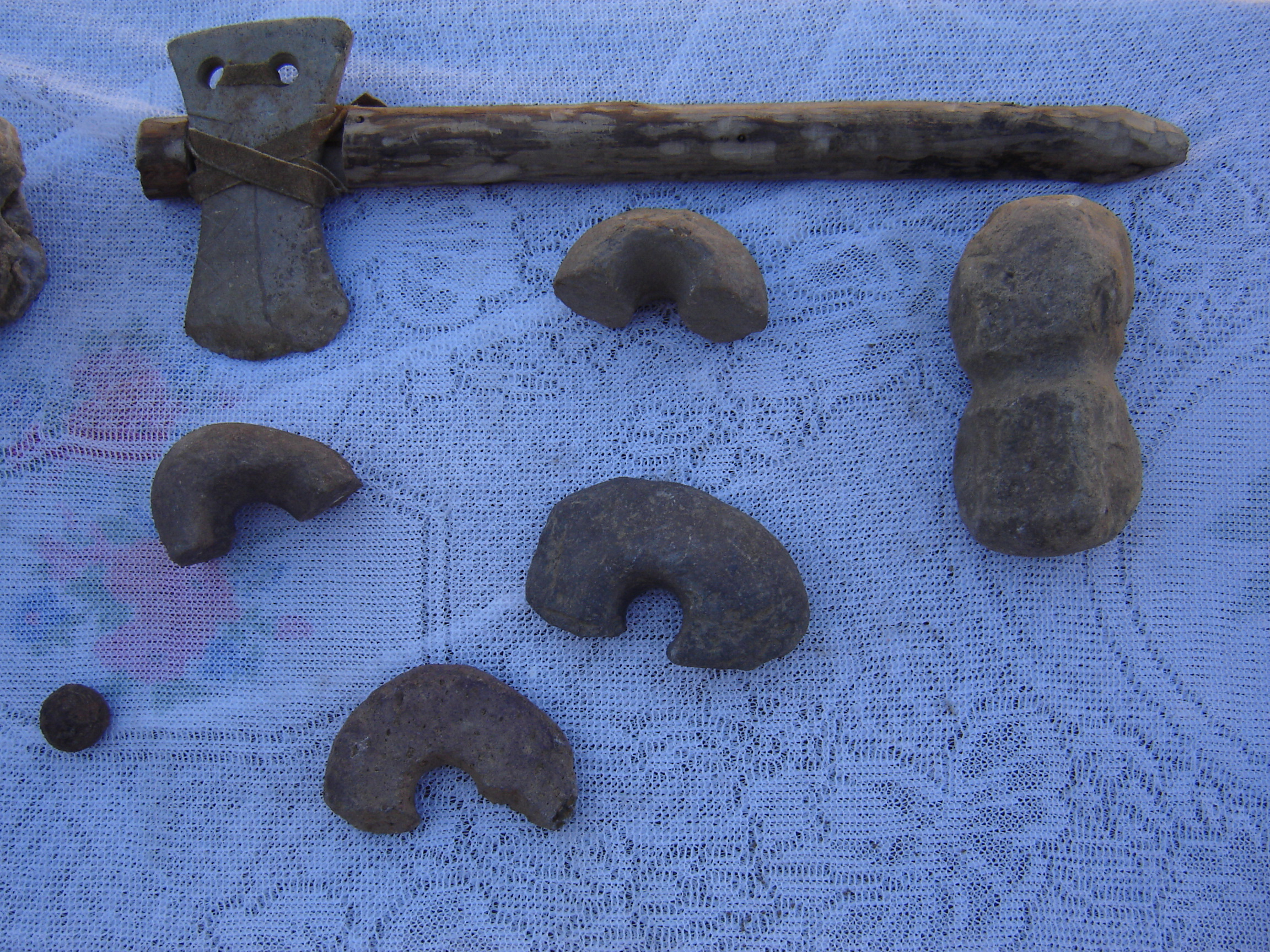 Algunas piezas arqueológicas de pueblos y culturas antiguas que habitaron en la población de Vacas, que fueron encontrados durante las nuevas construcciones. Pertenecen a colecciones particulares. Runa Simi: Ñawpa runakuna Wak'aspi tiyakuqkunaqta puchu ruwaykunasninku tarisqa musuq wasi ruwaykunapi.